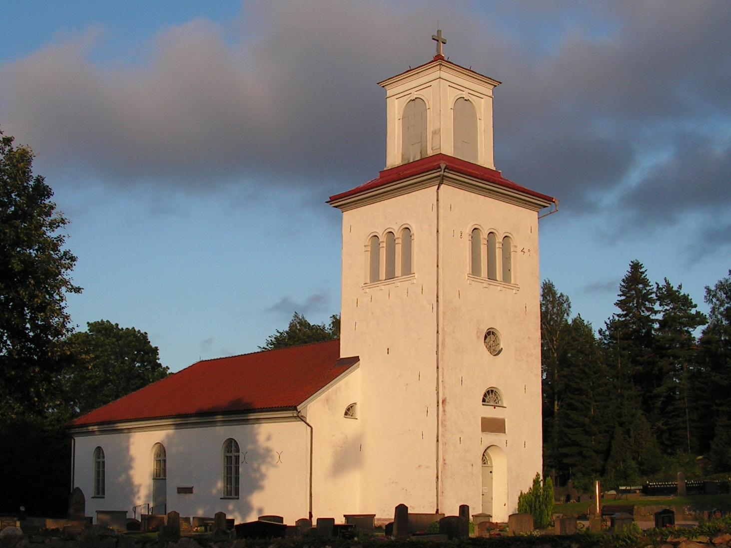 Herrestads kyrka, Uddevalla, Sweden